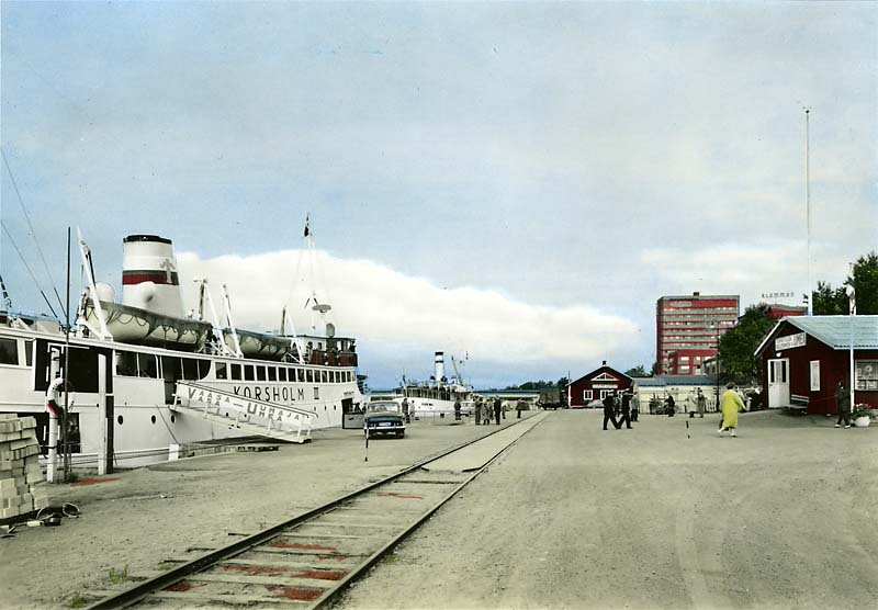 Finlandsbåten. Handkolorerad variant av ac1189.; Byggnadsverk; Hamnanläggning; Hamnmiljöer; Kommunikationsväsen; Miljöer